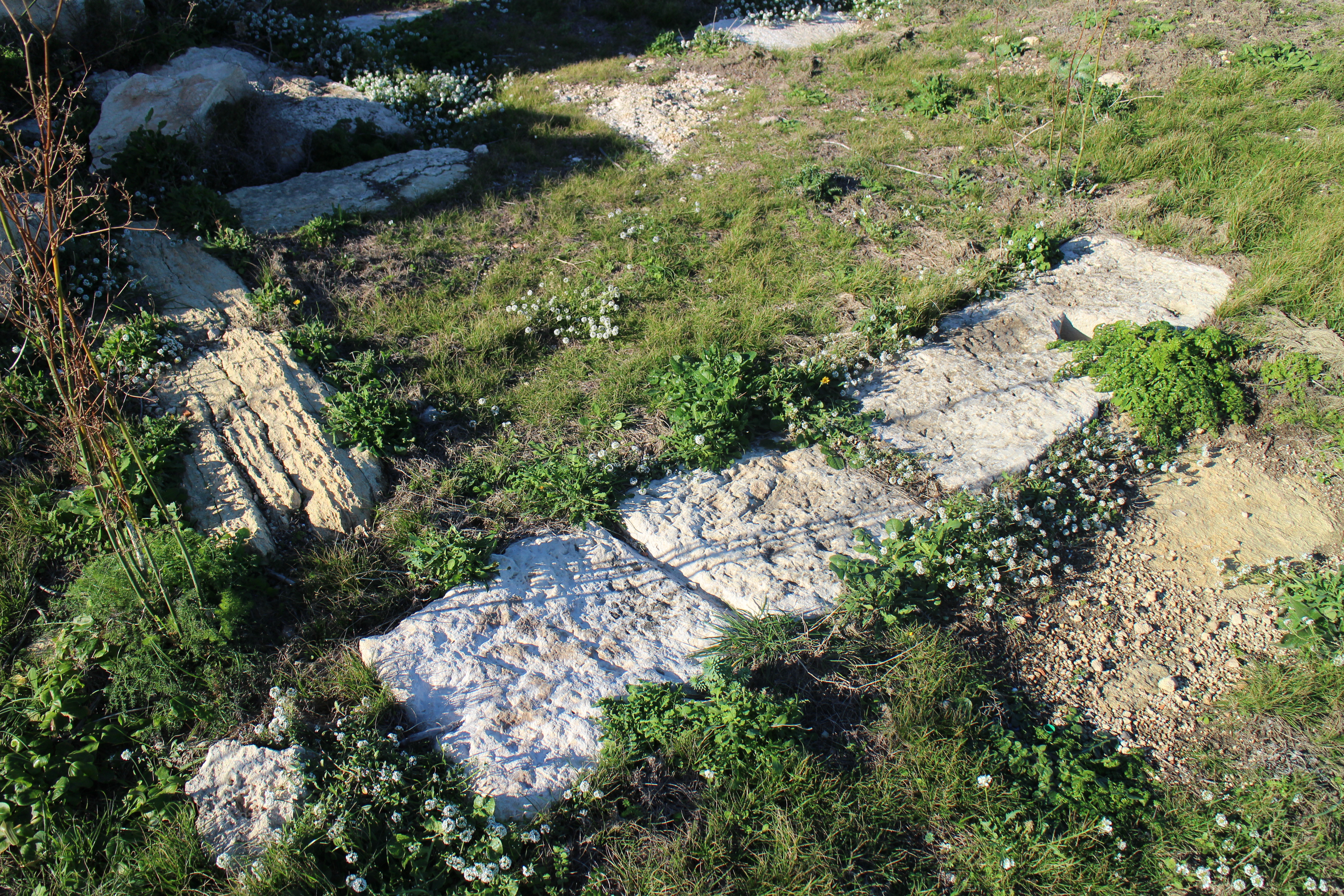 Ras ir-Raheb